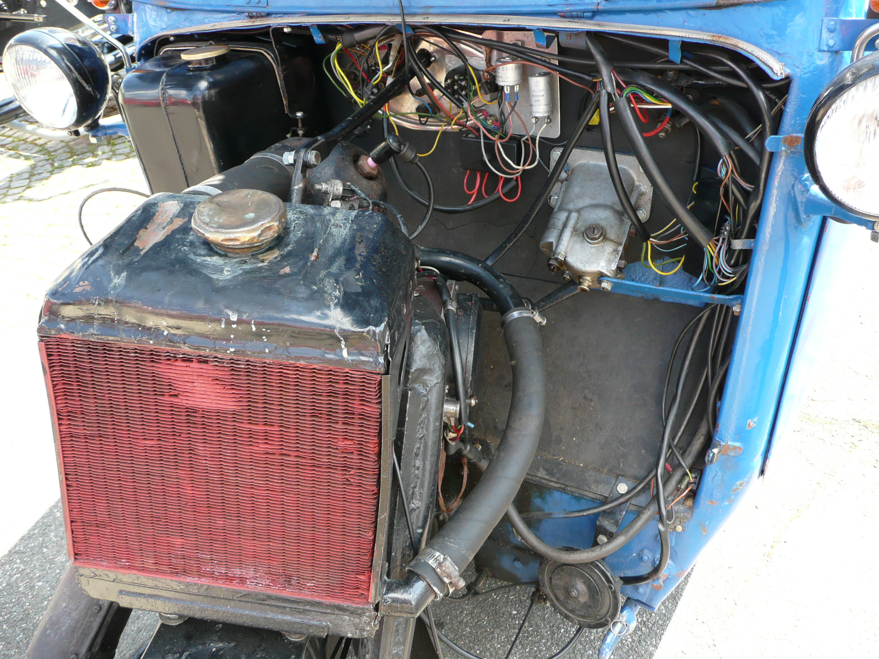 Tempo Dreirad A400 Motoransicht 2008 in Nürnberg